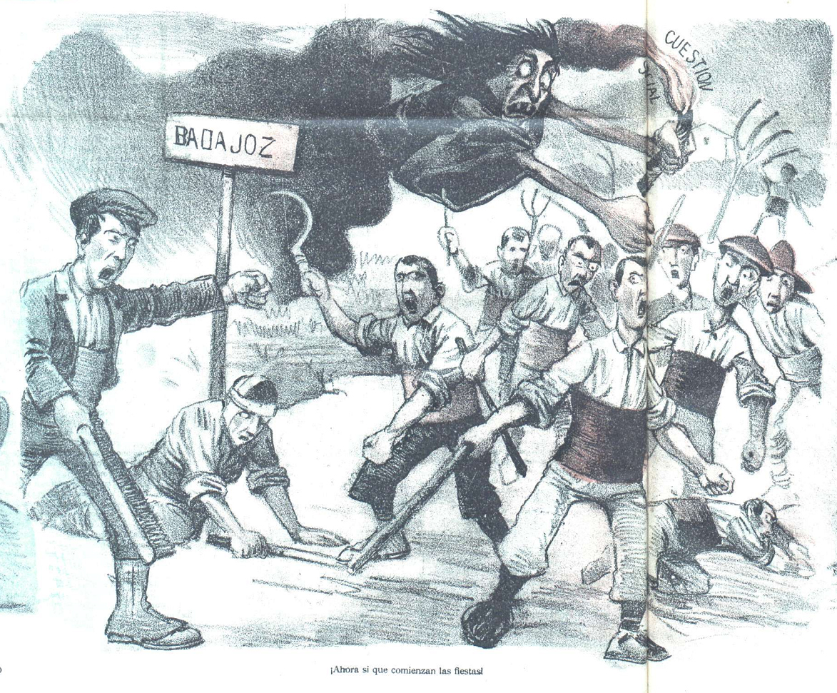 Caricatura.